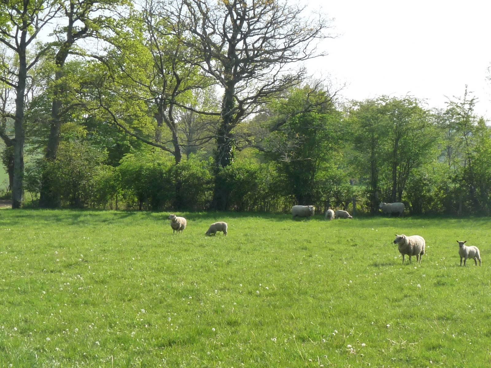 Prés et brebis, Suris, Charente, France